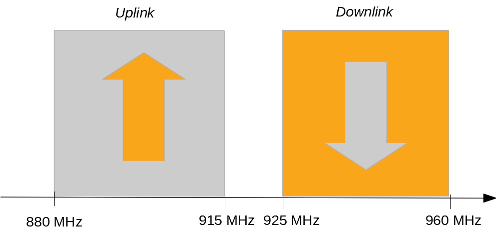 Plik pokazuje zakres częstotliwości dla pasm "uplink" (w górę) i "downlink" (w dół), które używane są w systemie GSM w zakresie zwanym E-GSM. To samo pasmo jest wykorzystywane również w LTE jako Band 8.